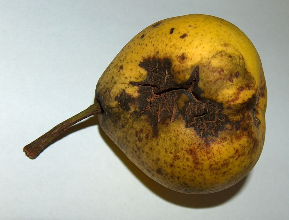 Birnenschorf (Venturia pirina)